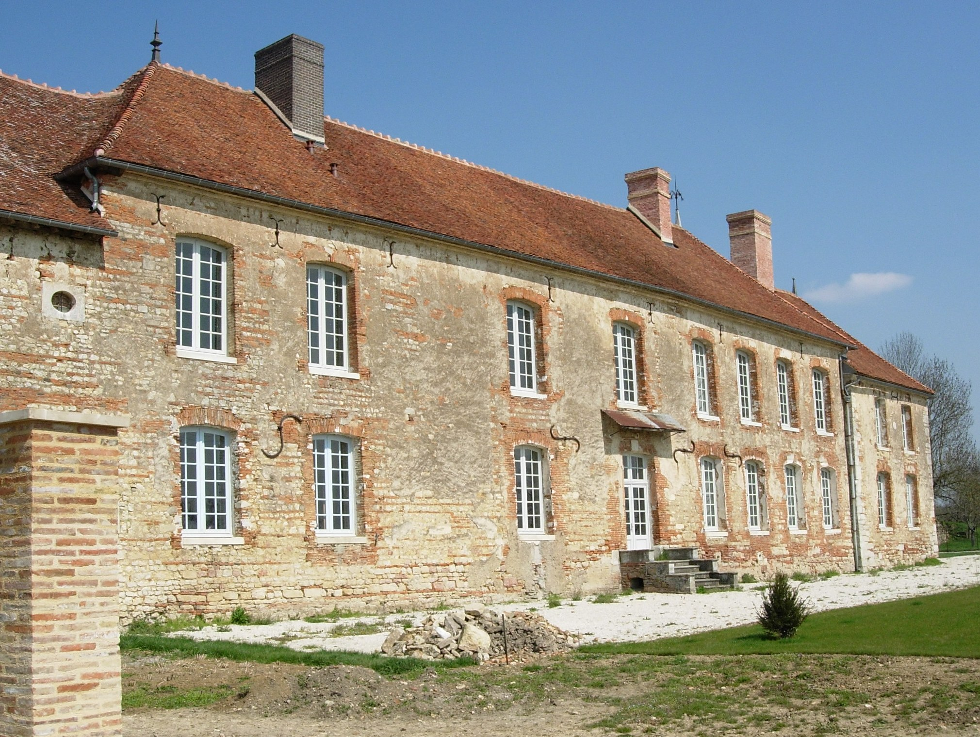 Abbaye de Monthieramey